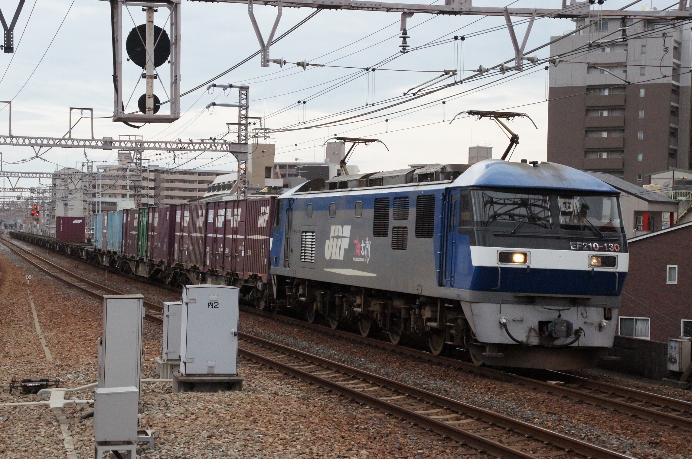 JR貨物 EF210形（梅田貨物線）